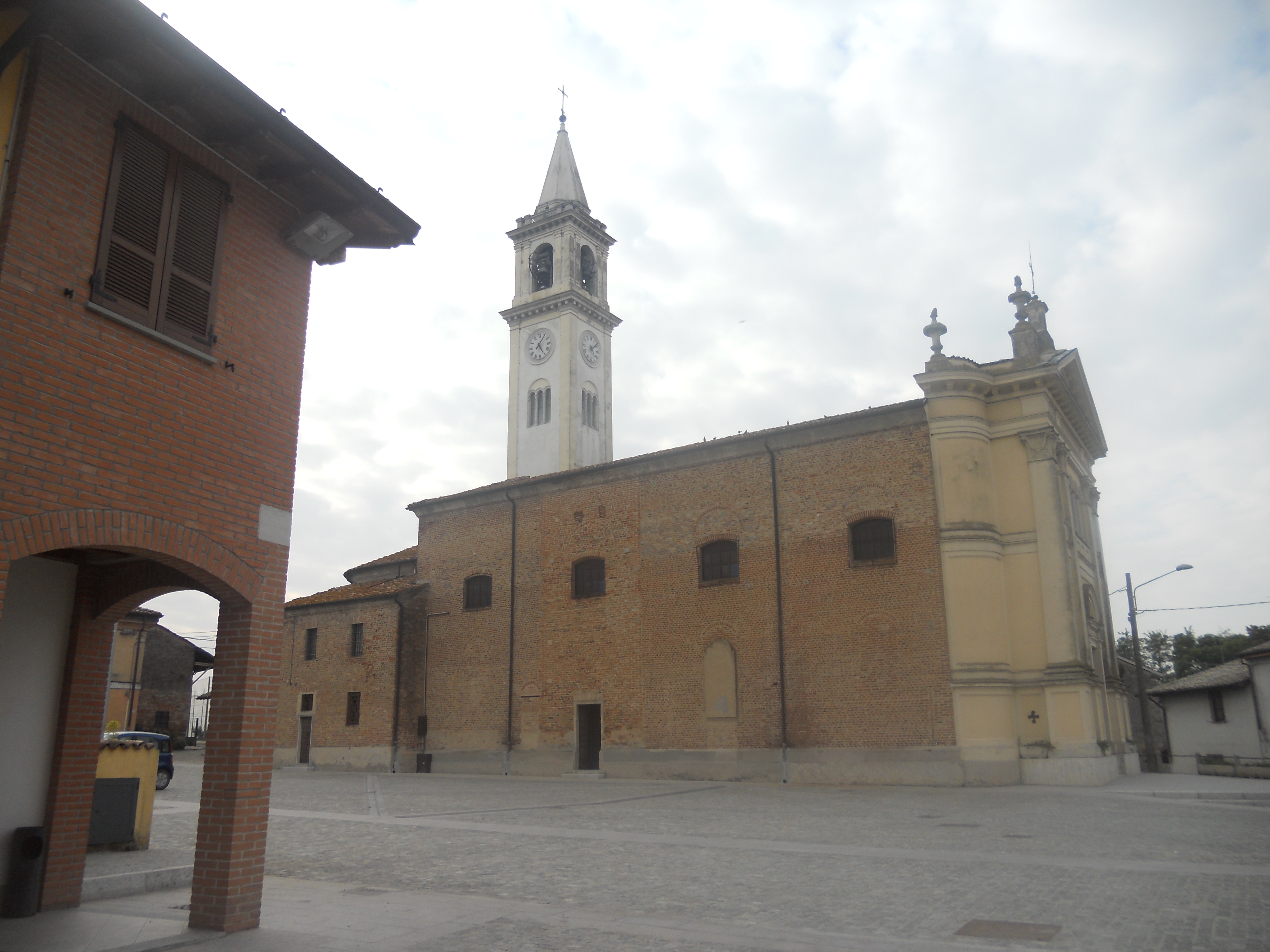 Piazza di Gombito